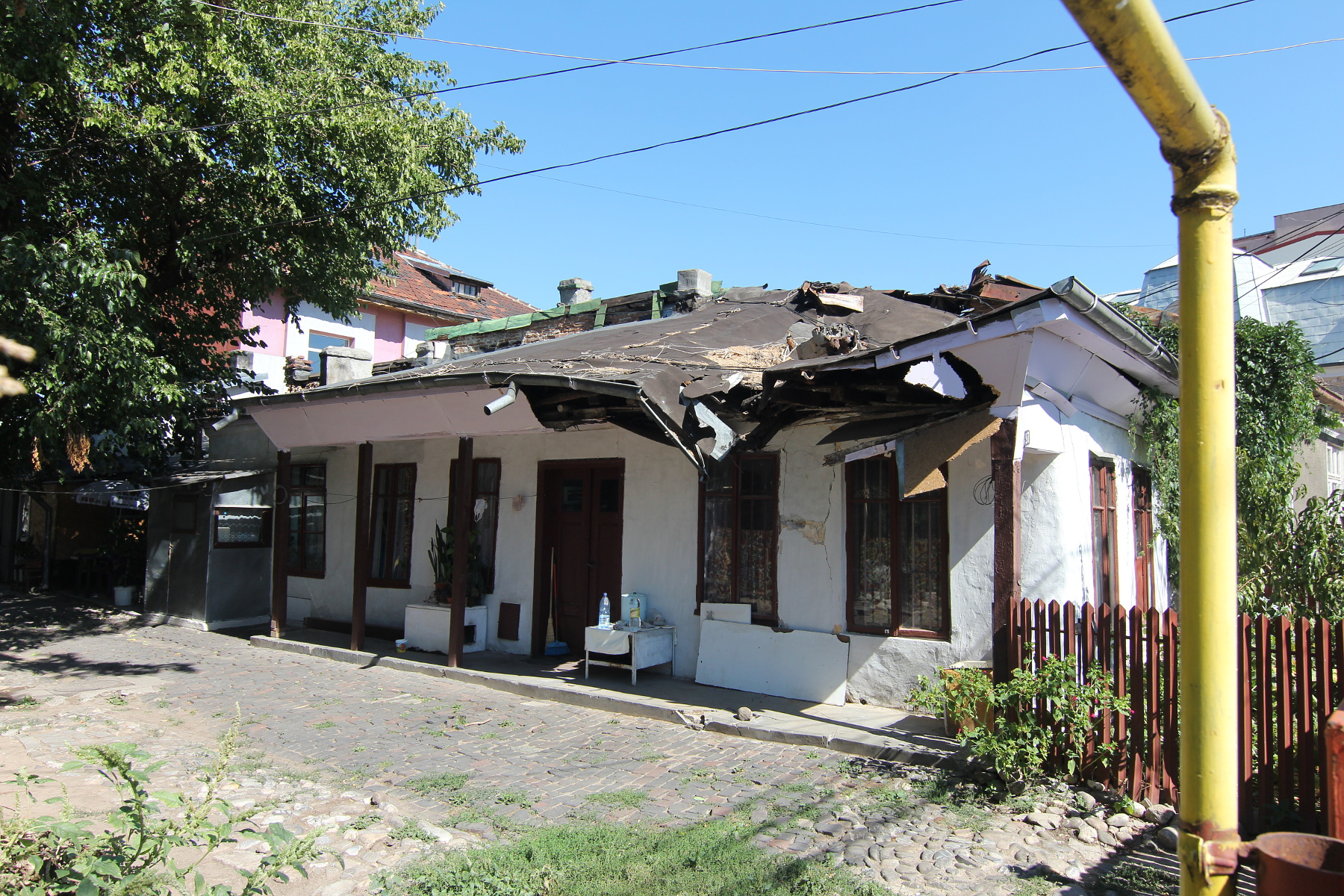 Casă de târgoveț